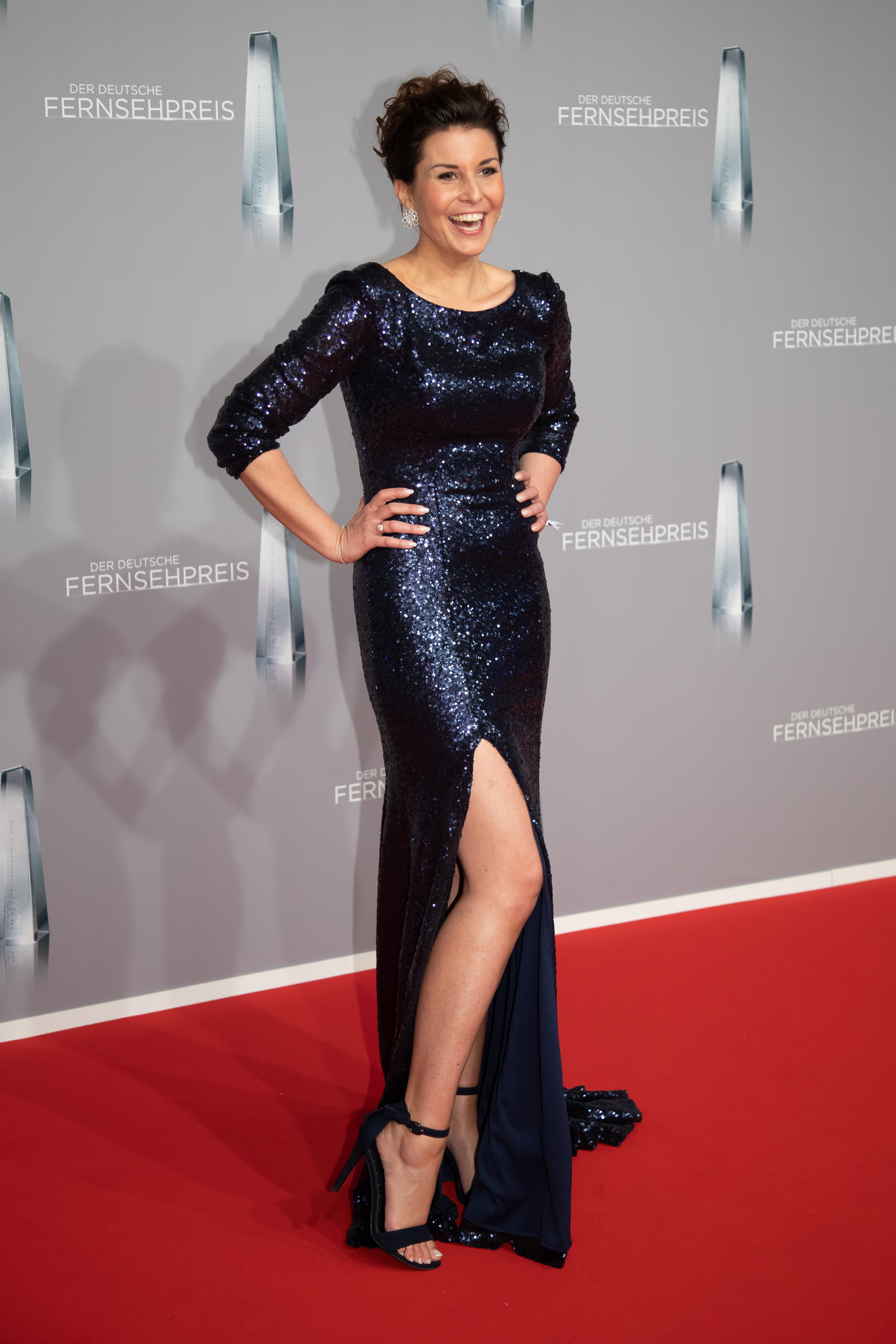 Vanessa Blumhagen beim Deutschen Fernsehpreis 2019 in der Düsseldorfer Rheinterrasse